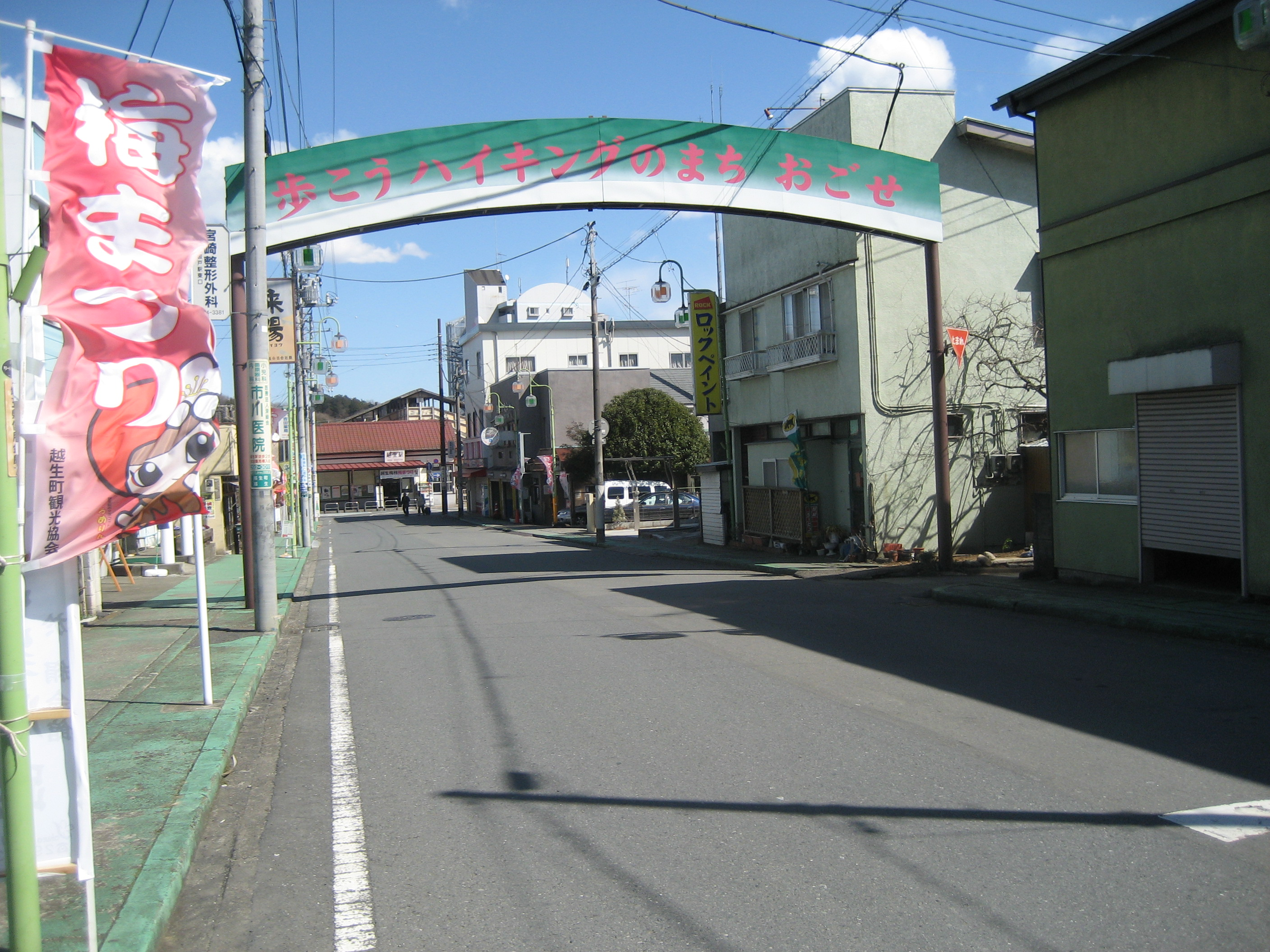 埼玉県道187号線越生駅付近